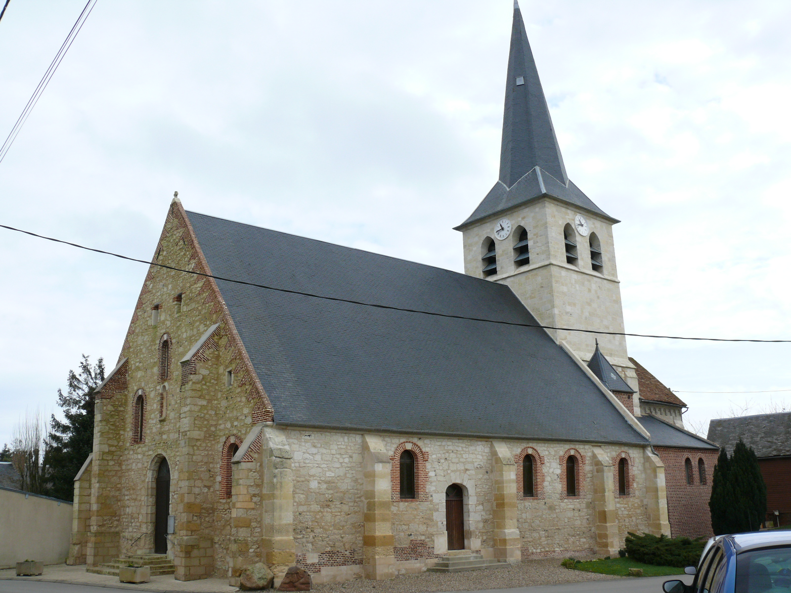 Francastel (Oise) - L'église